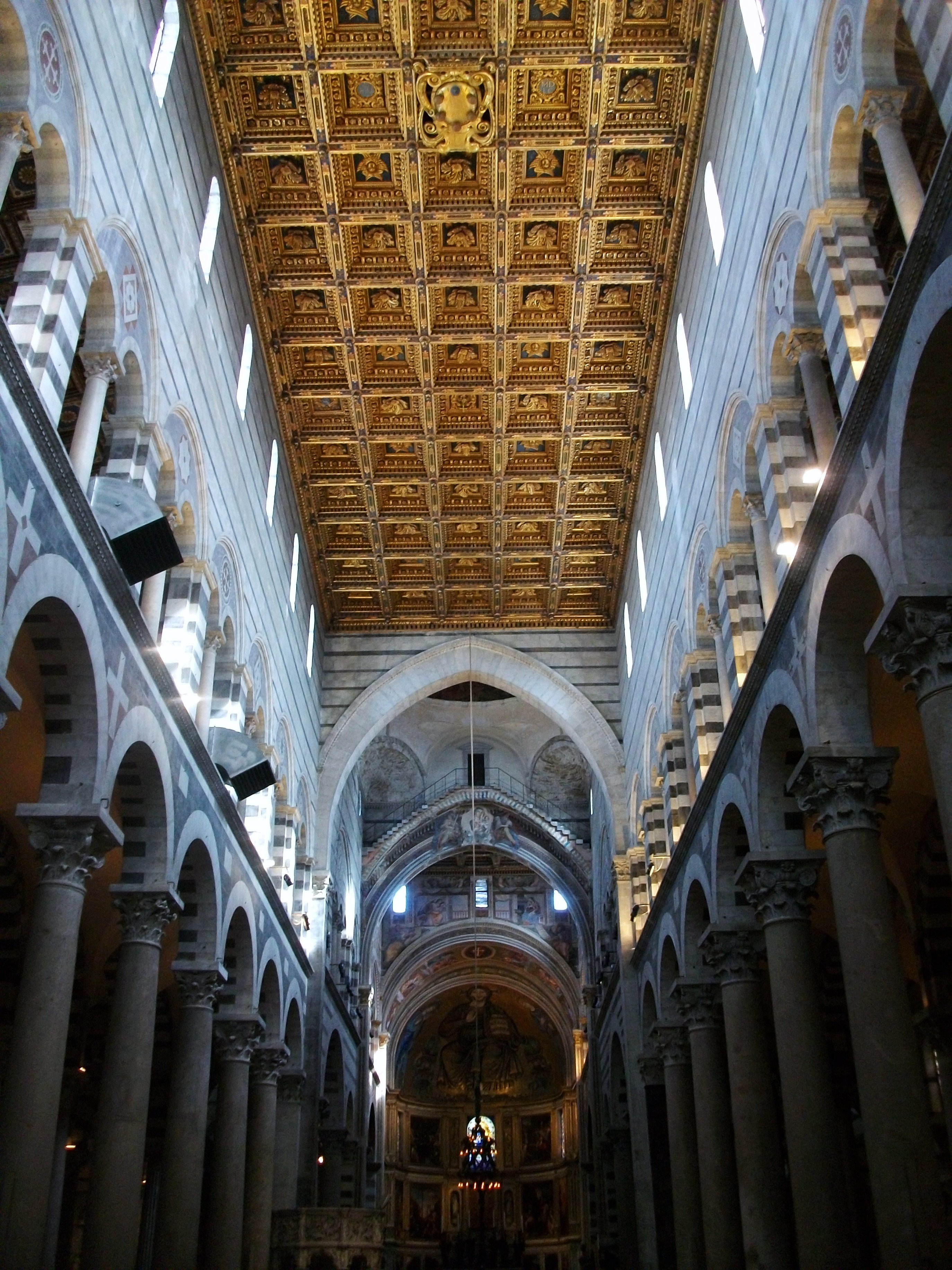 Interior de la catedral de Pisa.